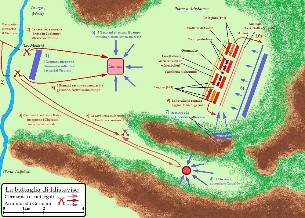 La battaglia di Idistaviso del 16 d.C. (giustificativo mancare)